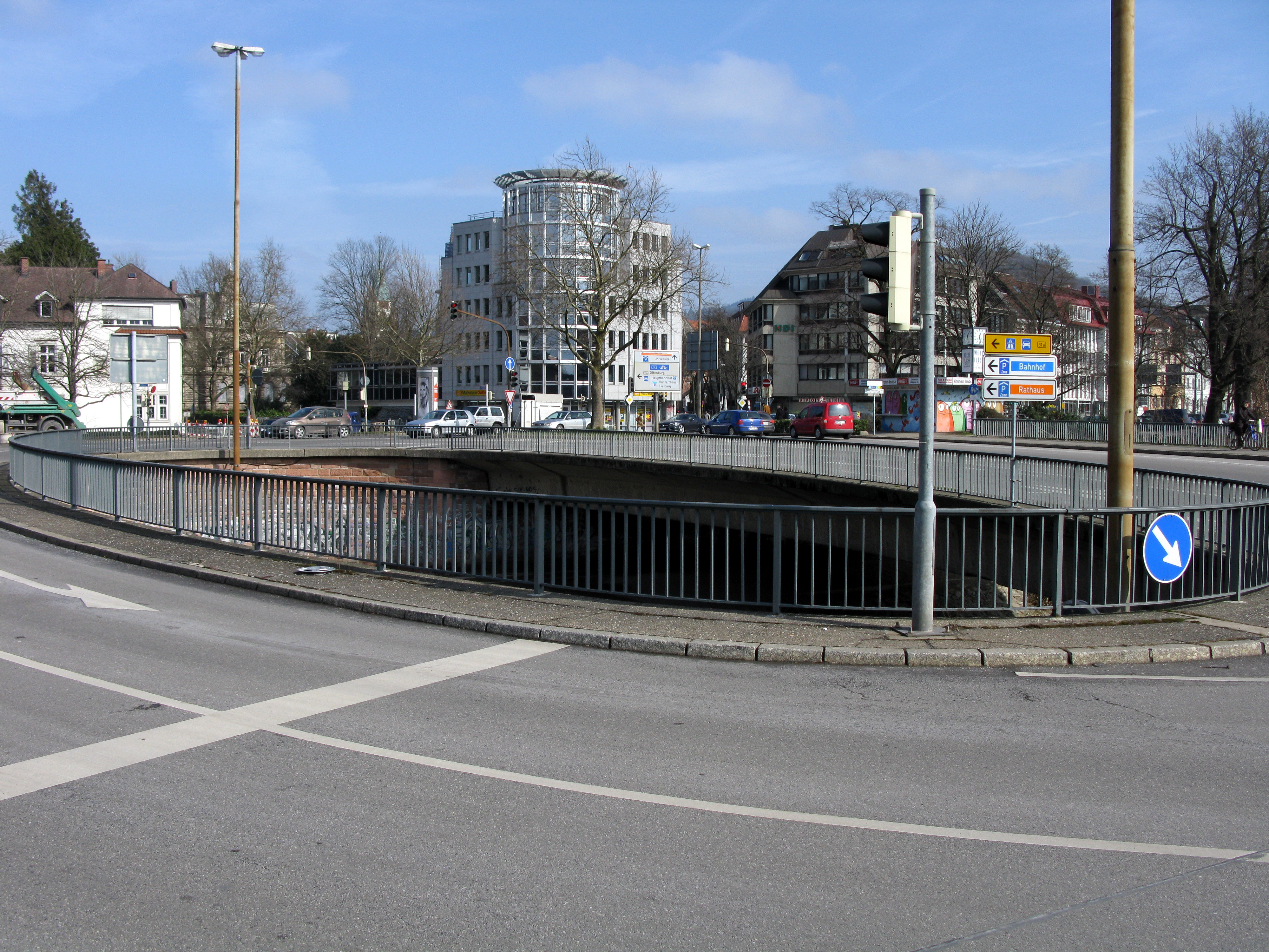 Kronenbrücke in Freiburg im Breisgau